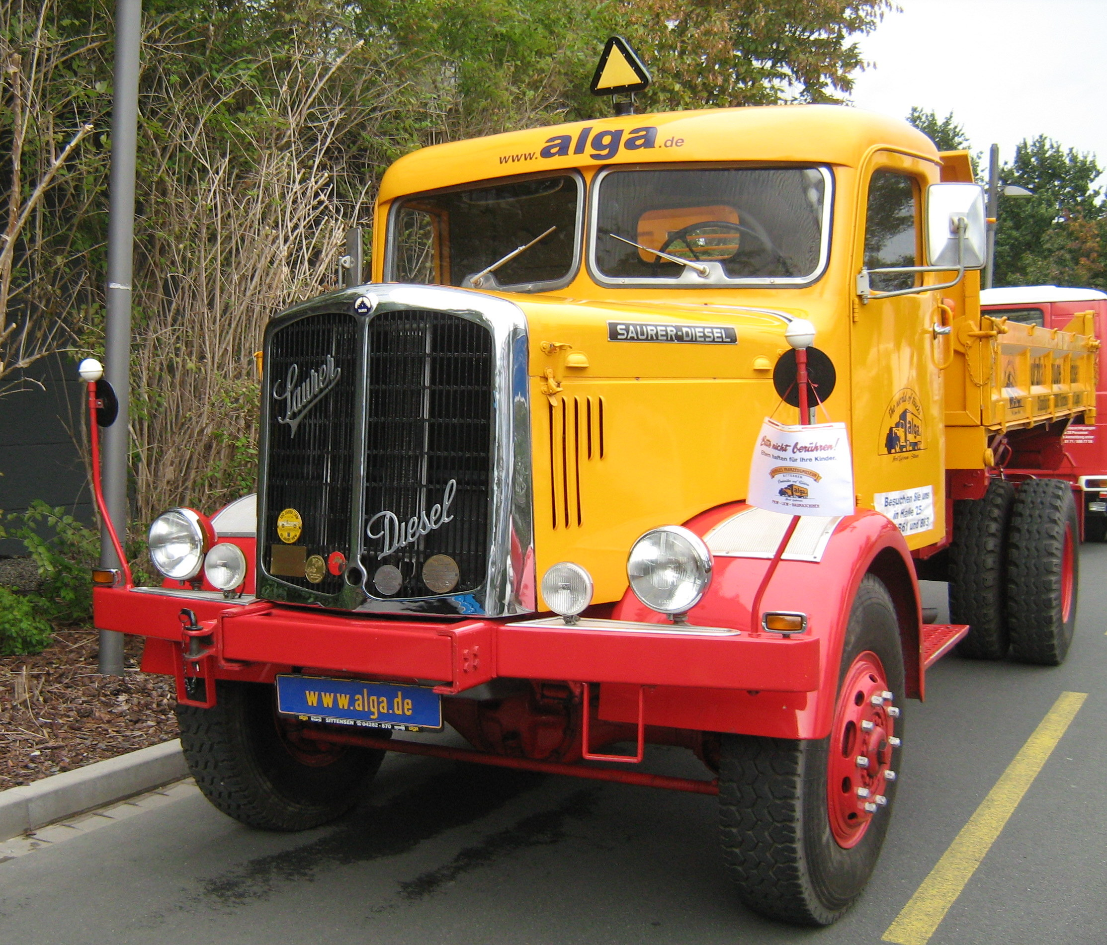 alter Saurer LKW - Baujahr um 1950 (?)